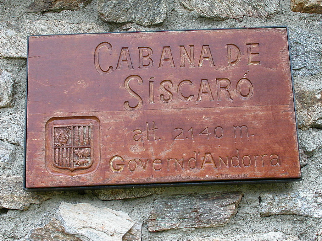 Refuges Andorre